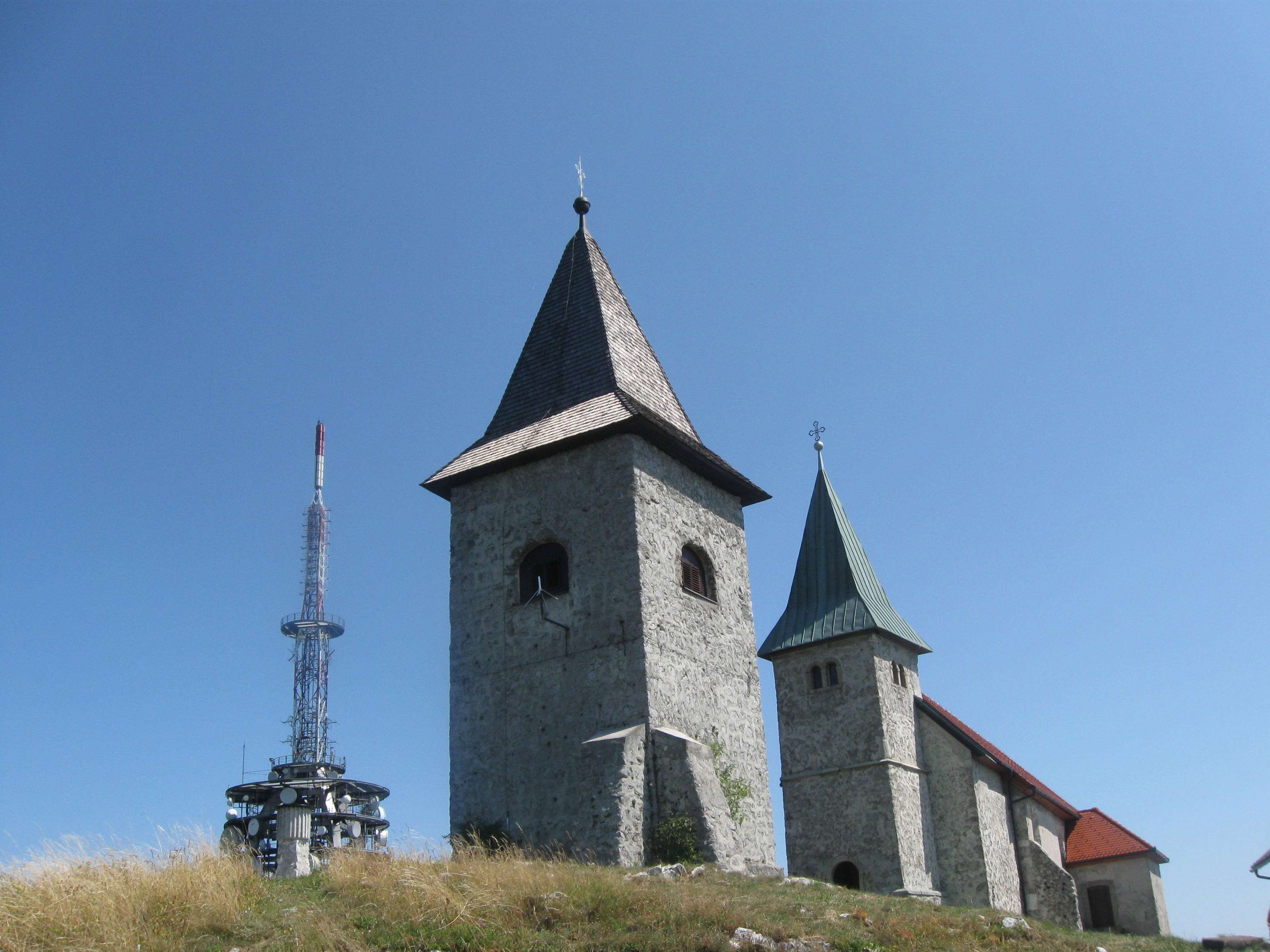 Kum cerkev oddajnik 1